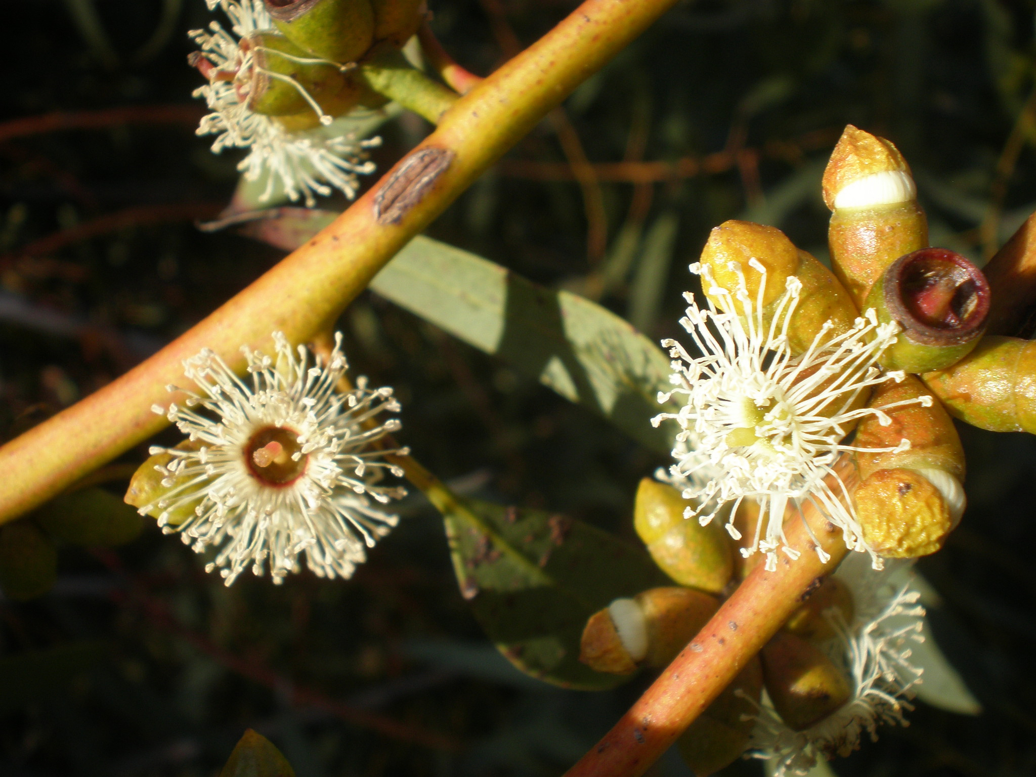 Jardín Botánico de Barcelona.